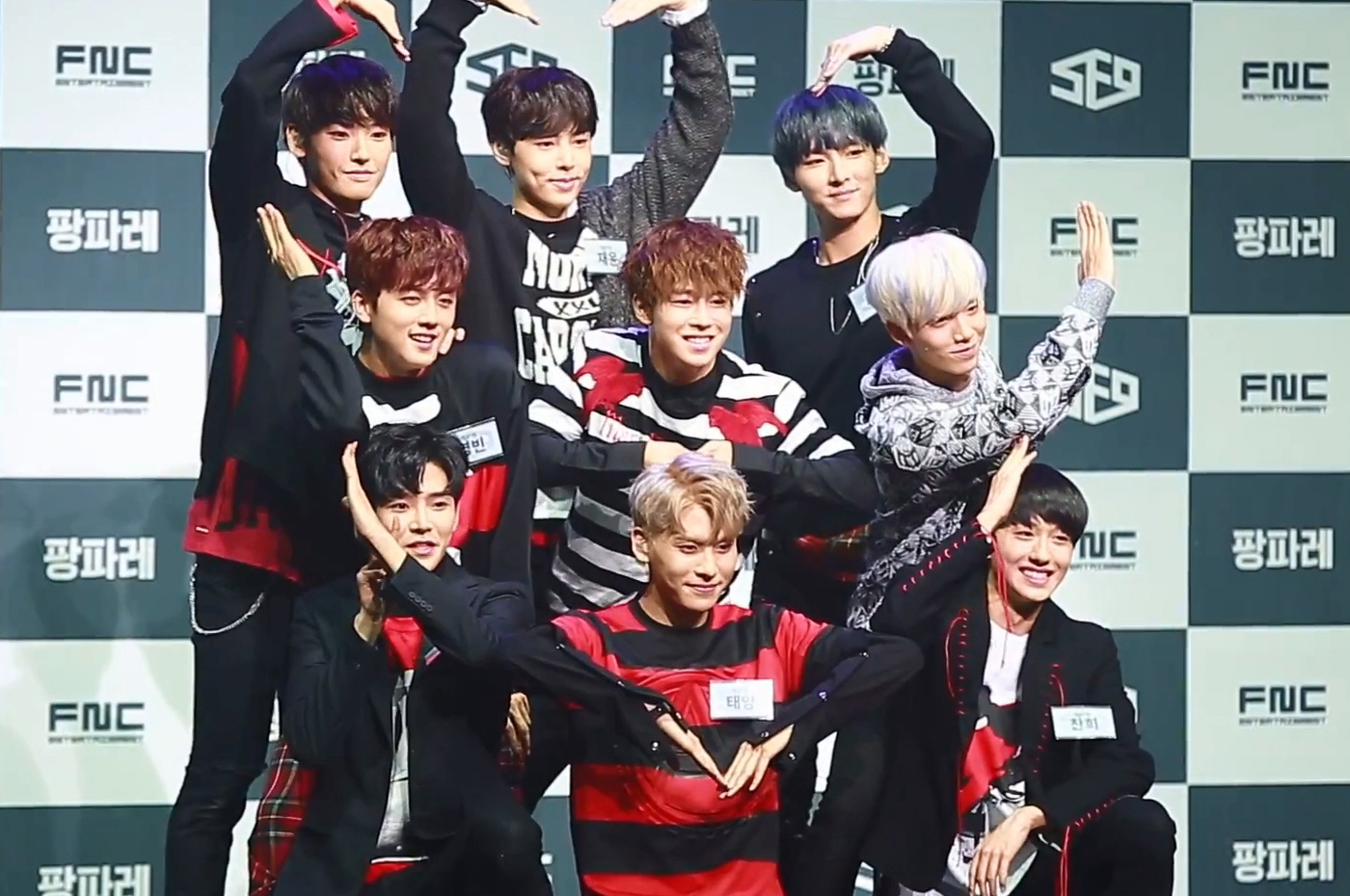 (TV10) SF9(에스에프나인), 숨겨왔던 매력으로 ‘팡파레’를 울리다 (쇼케이스 인터뷰 영상)